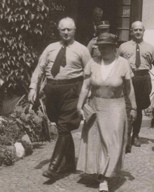 Gauleiter Jakob Sprenger mit Gattin, 1933 bei einem Besuch des Kurhauses in Bad Salzhausen.